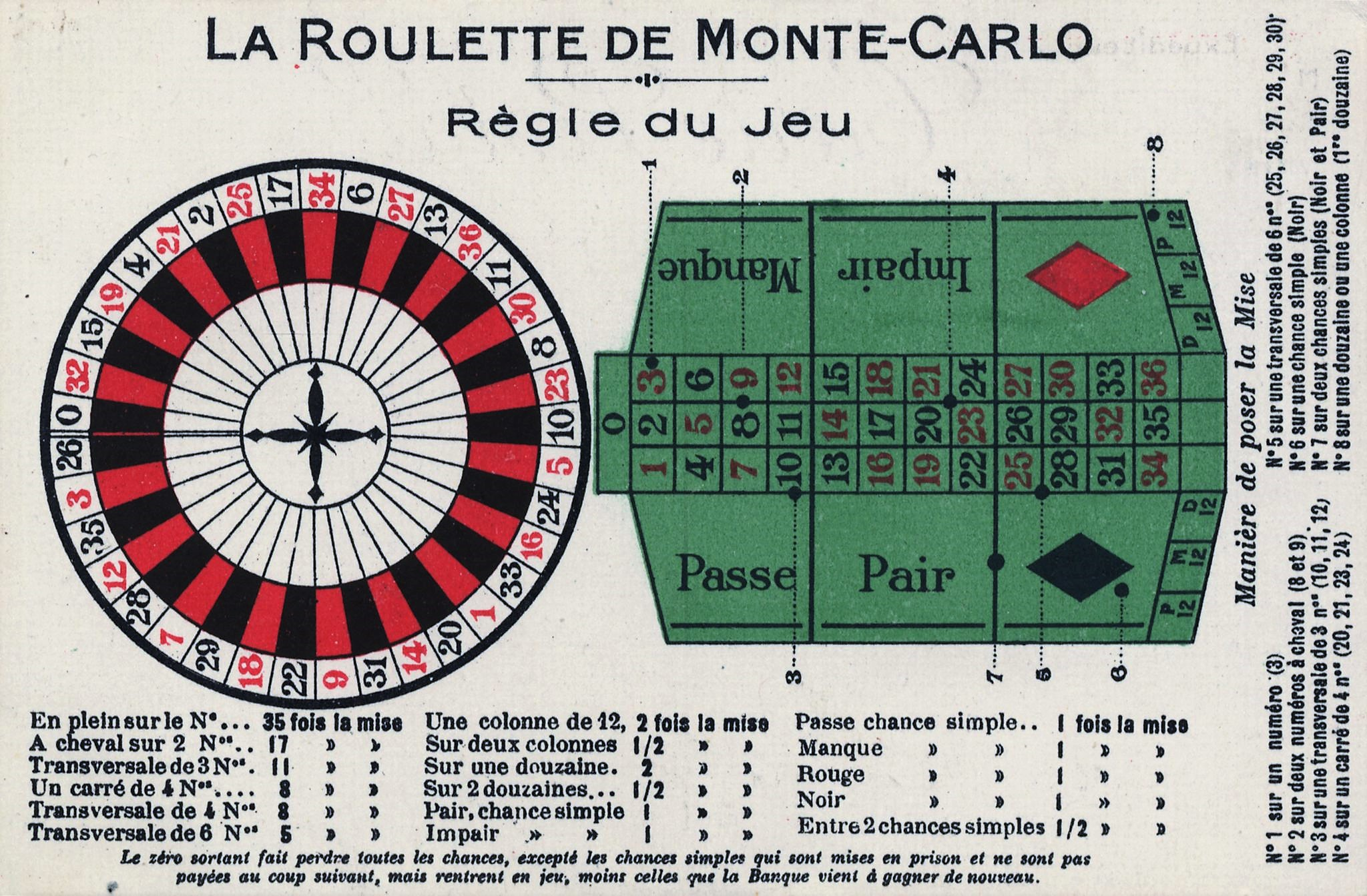 Ansichtskarte La Roulette Monte-Carlo, Règle du Jeu um 1900.